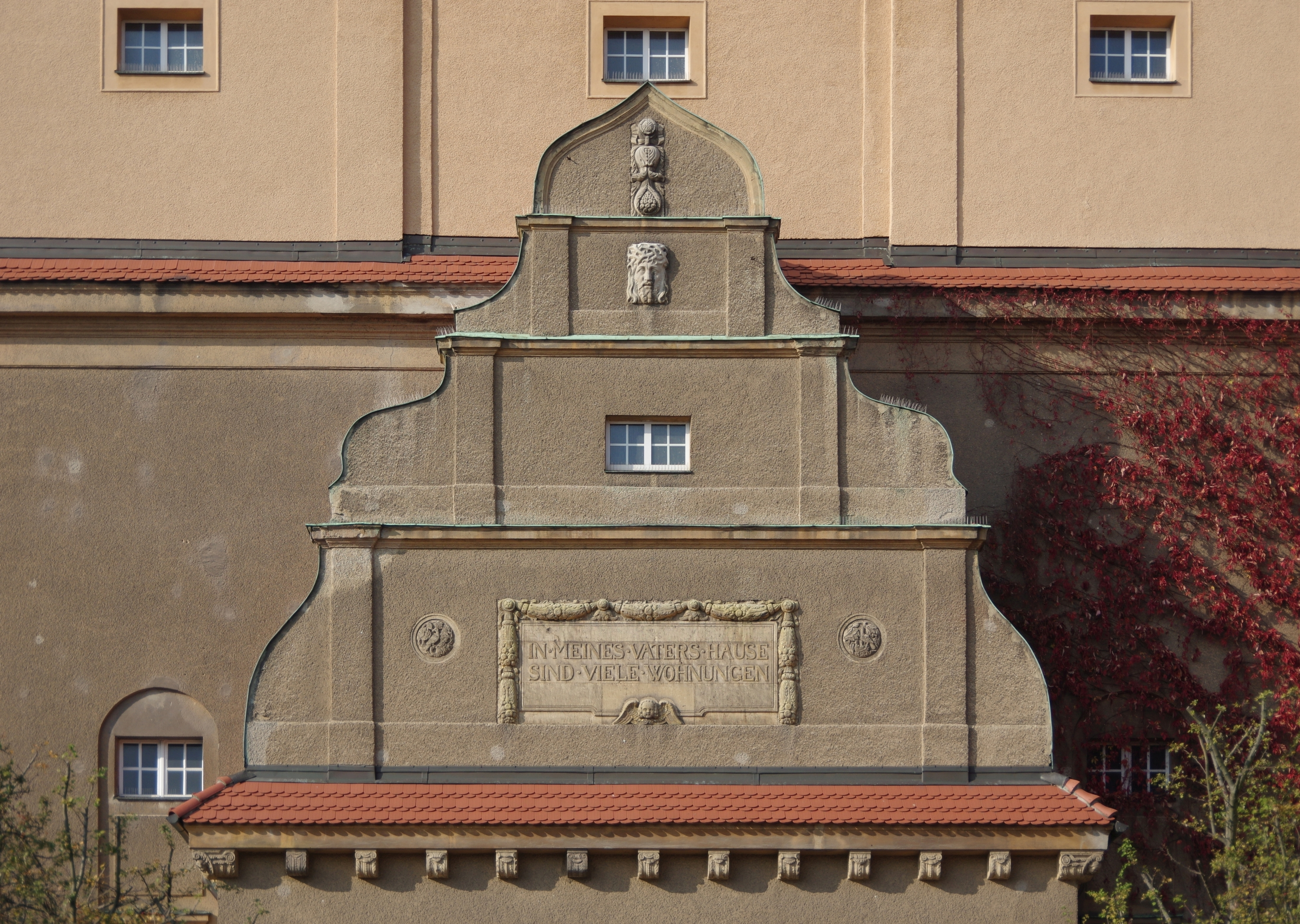 Baumschulstraße in Baumschulweg in Berlin. Die Kirche Zum Vaterhaus ist denkmalgeschützt.